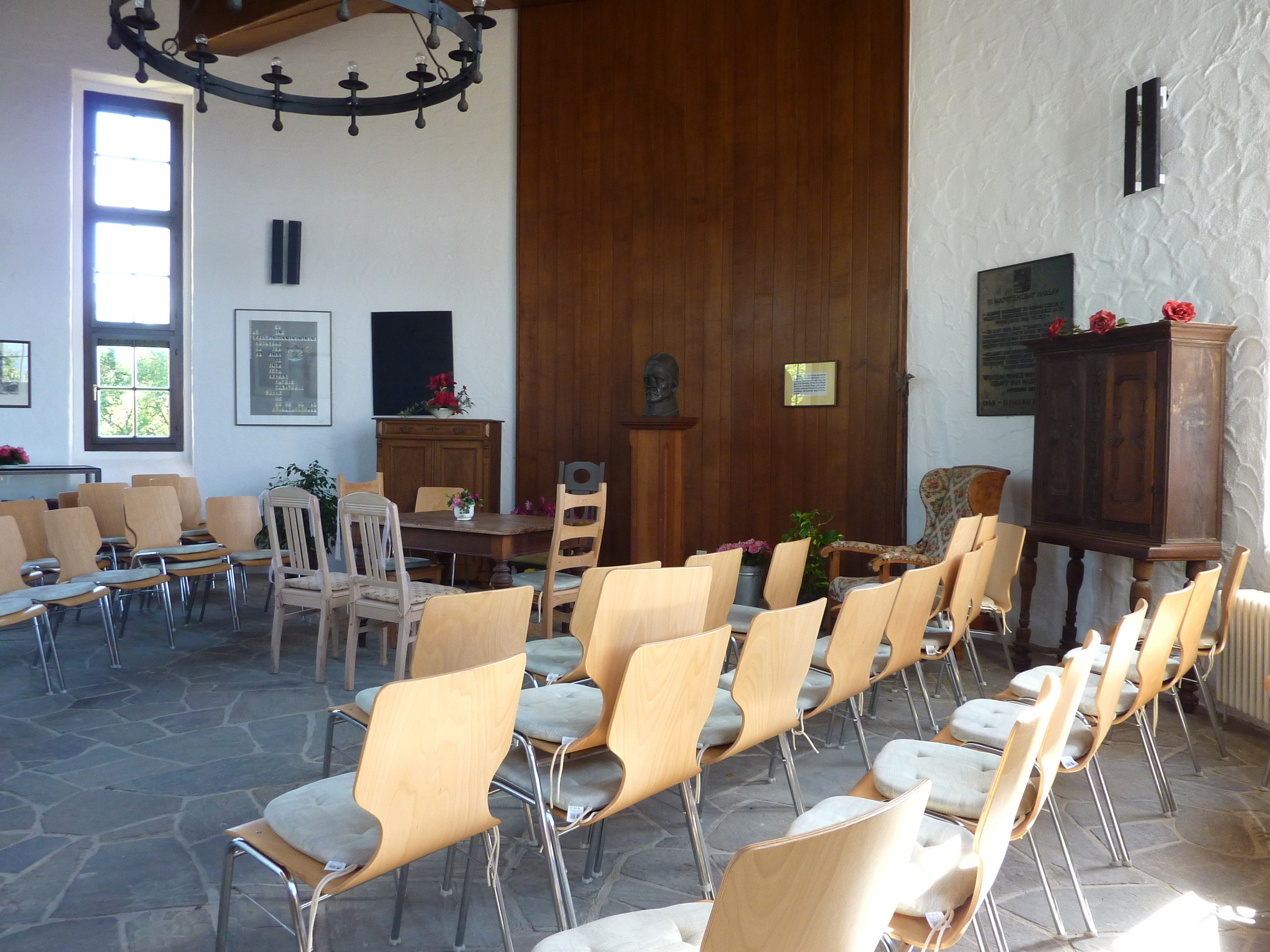 Gemeinde Grund (Hilchenbach)/Westfalen: Die Ginsburg, vom 13. bis 17. Jahrhundert Grenzfestung des Hauses Nassau auf dem Schlossberg. Innenansicht des in den Jahren 1967/68 auf den Grundmauern des ehemaligen Bergfrieds erbauten Aussichtsturms